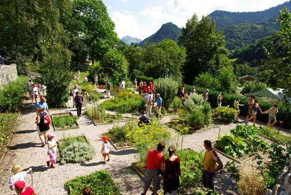 The Garden